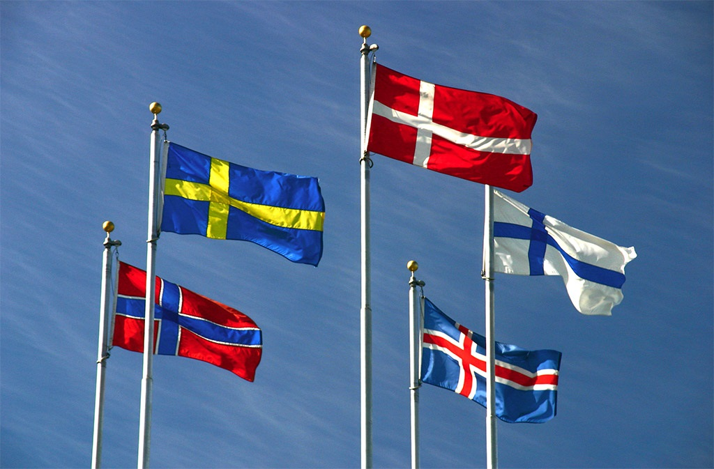 Image inversée pour un besoin d'illustration spécifique.